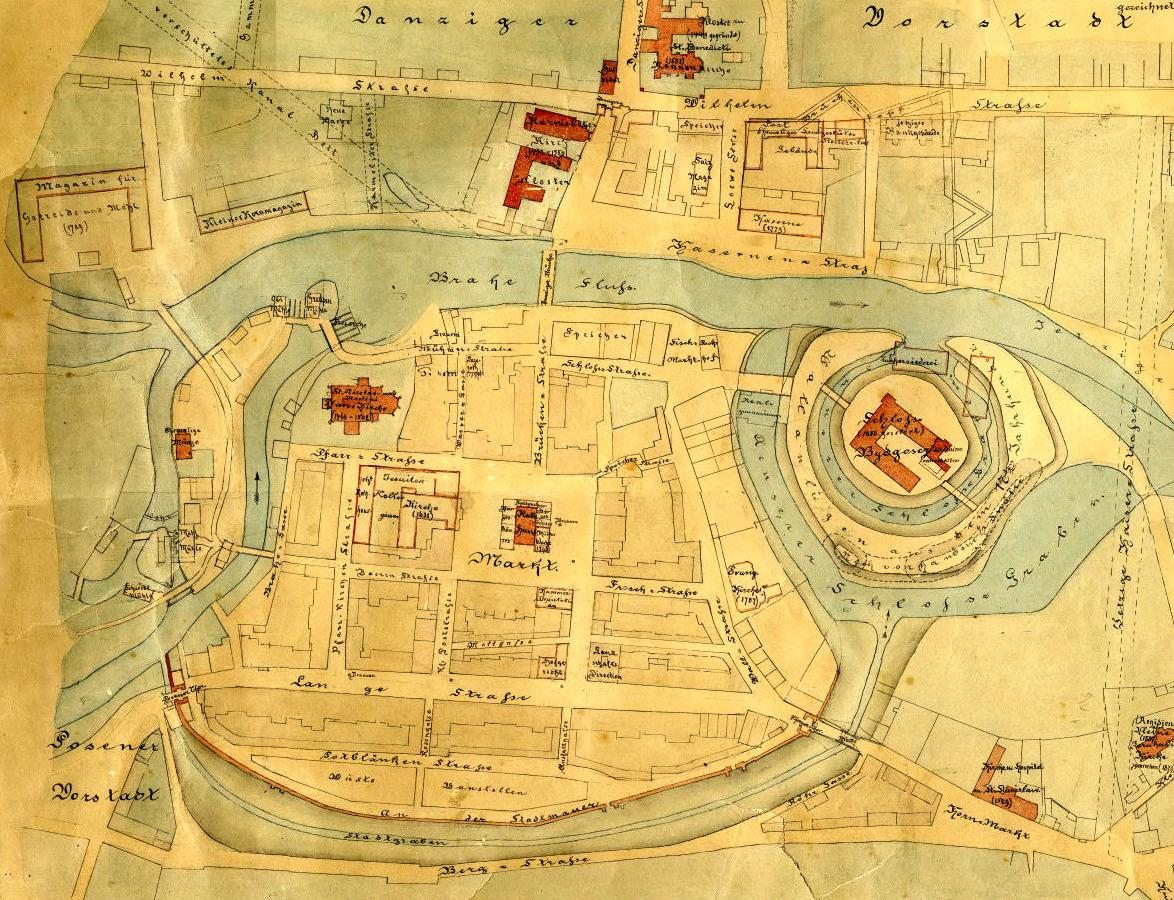 Rekonstrukcja planu XVI-XVIII wiecznej Bydgoszczy wykonana w 1890 r.